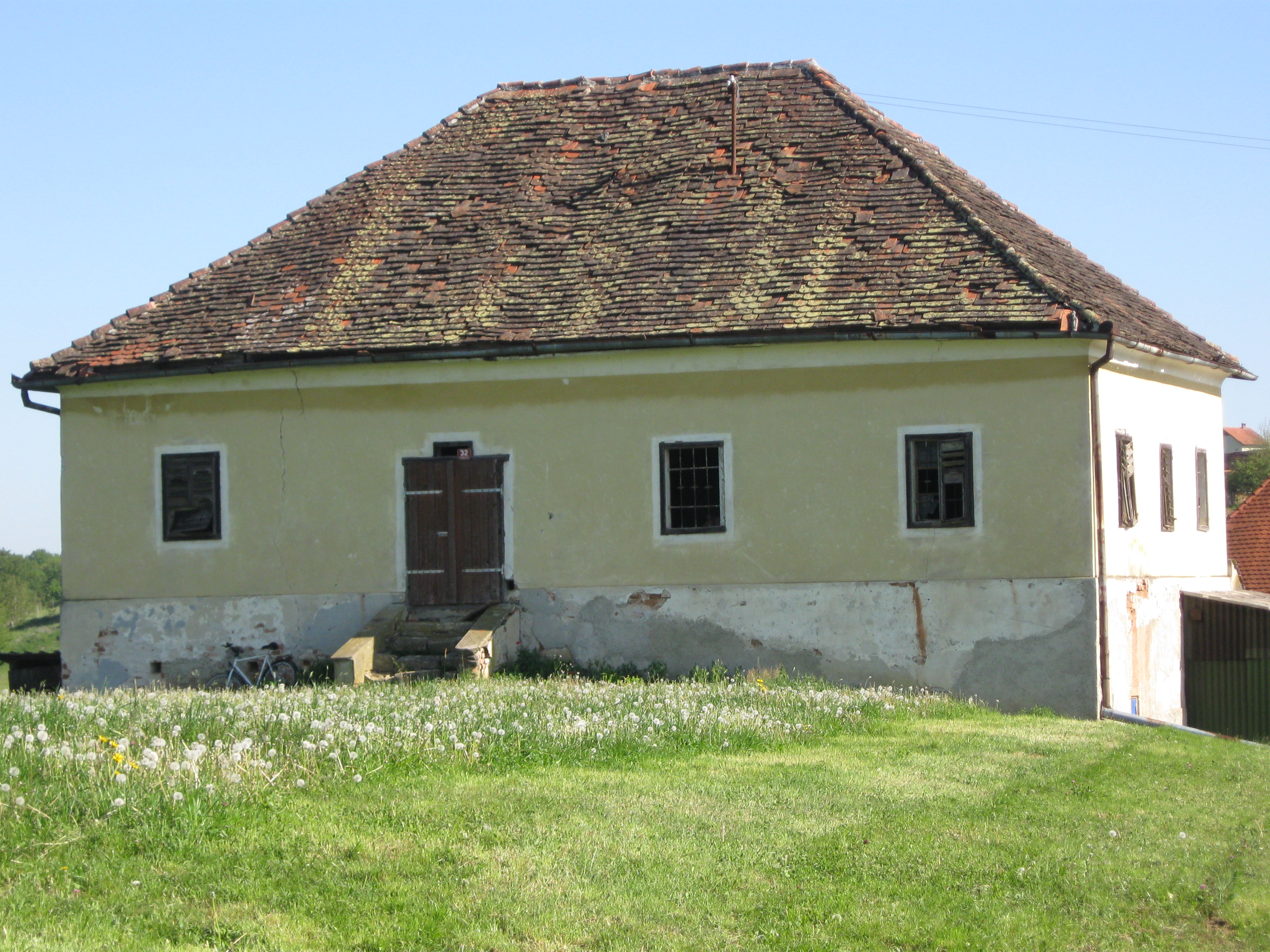 Nekdanja gosposka zidanica zgrajena proti koncu 19. stol. Vpisana v register nepremične kulturne dediščine pod št. 18057